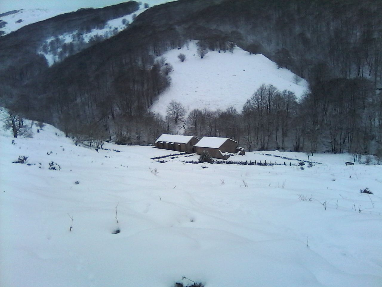 Belateko Monategia